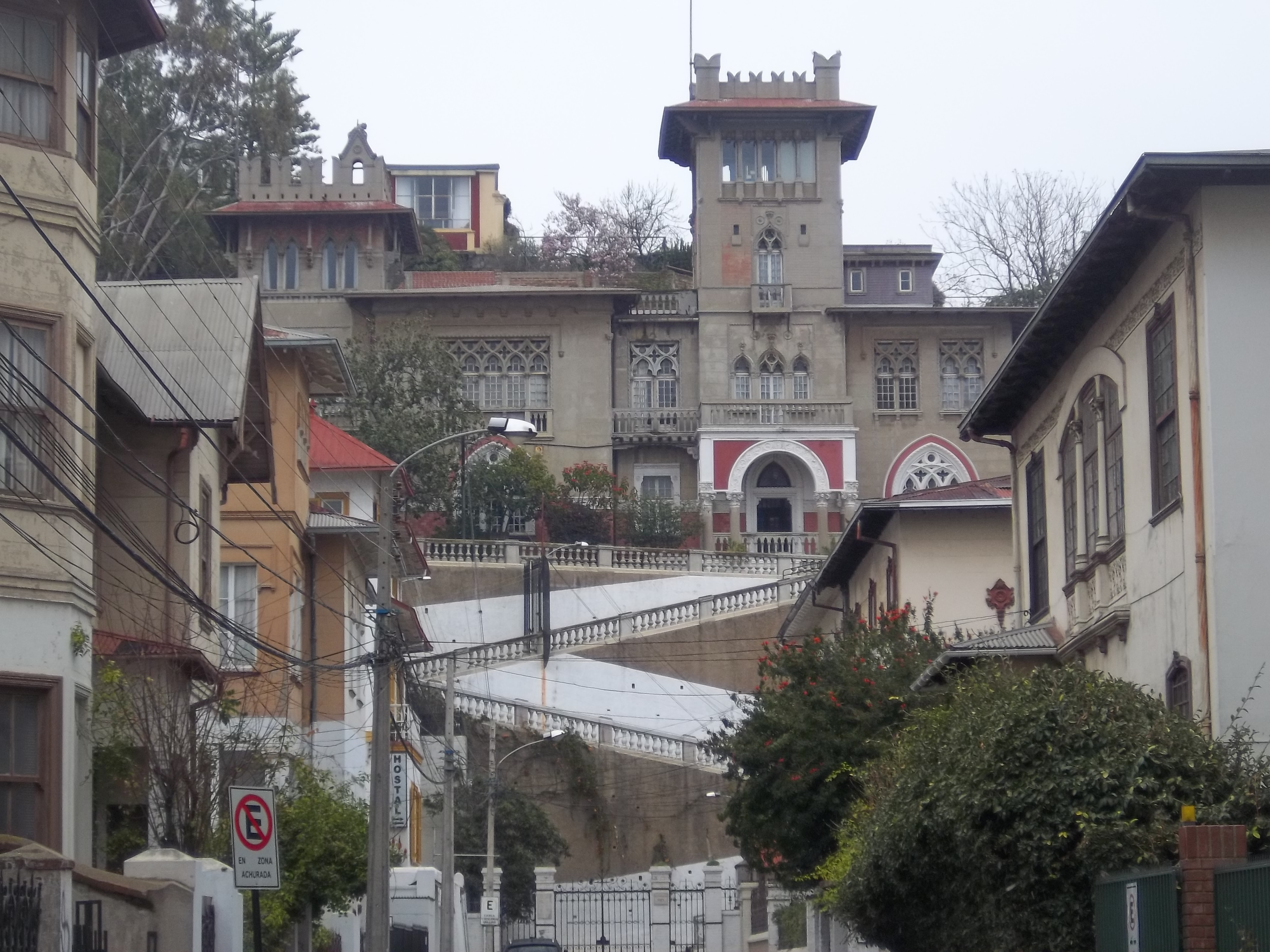 Palacio Valle, sede del Instituto de Historia de la Pontificia Universidad Católica de Valparaíso en Viña del Mar, Región de Valparaíso, Chile.